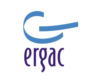 Ergac